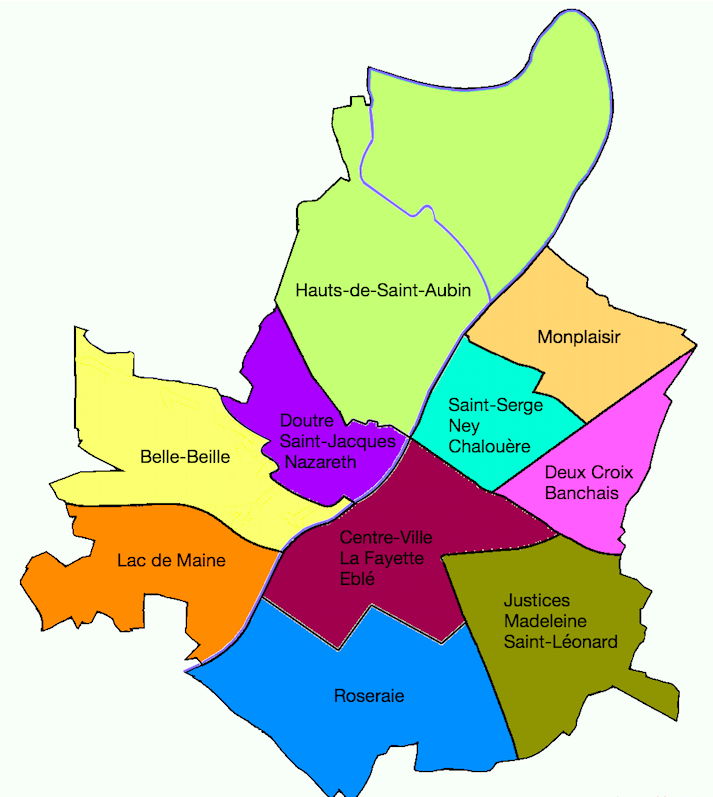 Plan schématique des quartiers administratifs d'Angers.